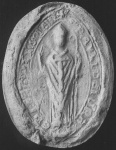 Balogh nembeli Szécsi Pál veszprémi püspök főpapi pecsétje